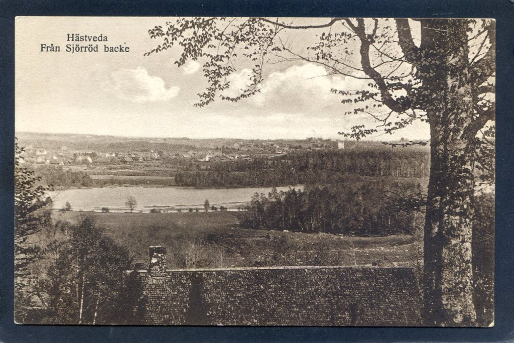 Hästveda från Sjörröd backe Vacker vy över Lilla sjö. Foto: Ingvert; Förlag: Konditoriet